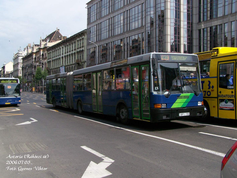 Ikarus 435-ös busz a gyors 239-es vonalon az Astoriánál